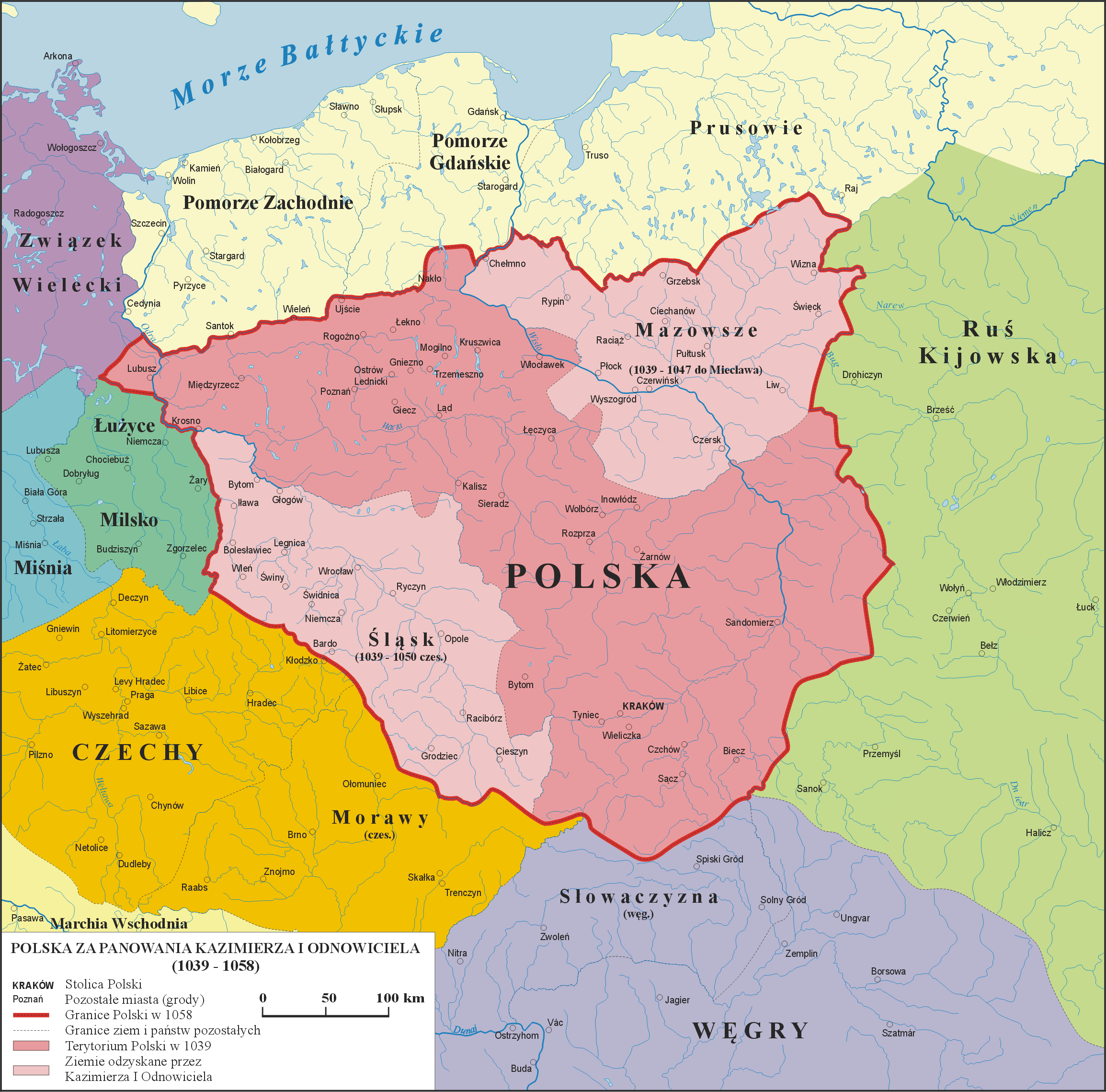 Mapa Polski za panowania Kazimierza I Odnowiciela (1039 - 1058)